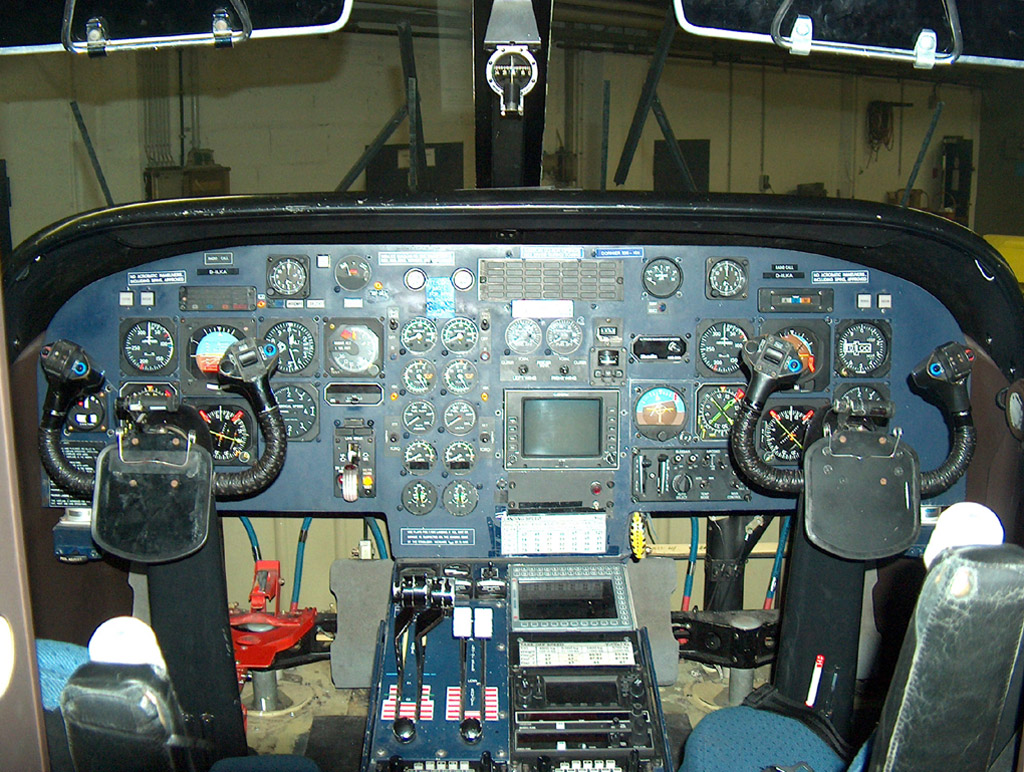 Aircraft: Dornier Do 228-100 Airline: Luftfahrtgesellschaft Walter mbH (LGW) Registration: D-ILKA Location: Dortmund Airport, Germany